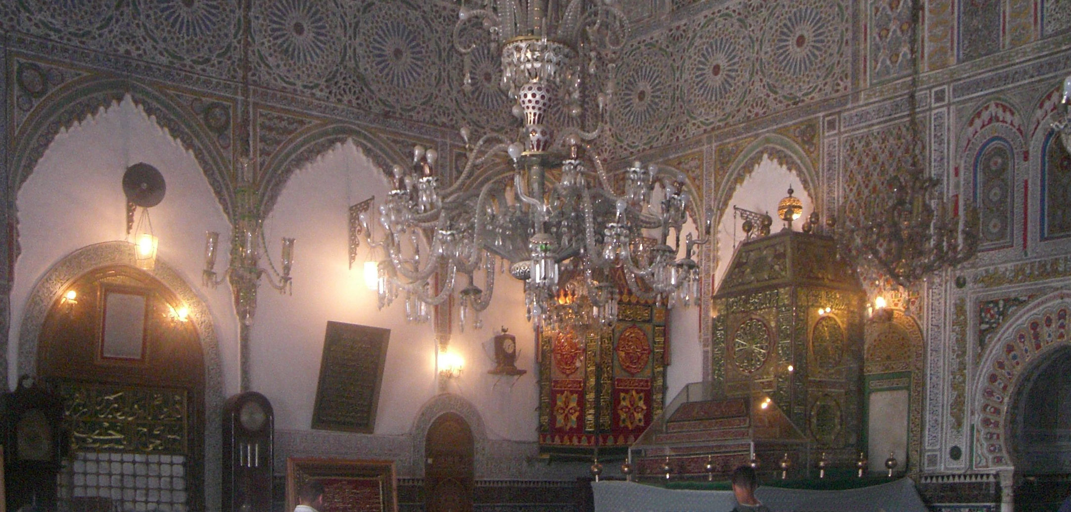 Fès Mausoleum Innenraum; part of Bild:Fes_Mausoleum_Moulay_Idriss_II_Innenraum.jpg from Benutzer:Katsumi